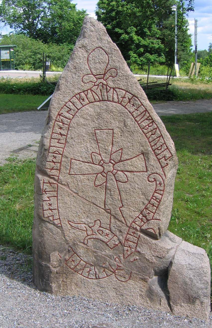 runestone U 165